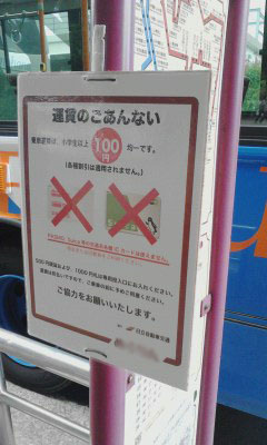 2014年現在、IC乗車券は使用できない。